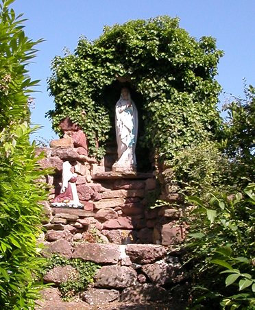 Statue de la Vierge Marie, reproduisant, avec la pierre locale, son apparition dans la grotte de Massabielle (Lourdes). En contrebas à gauche, une statue représentant Bernadette Soubirous. Auteur: Quedza Date: 23/6/2006 (cliché et redimension)